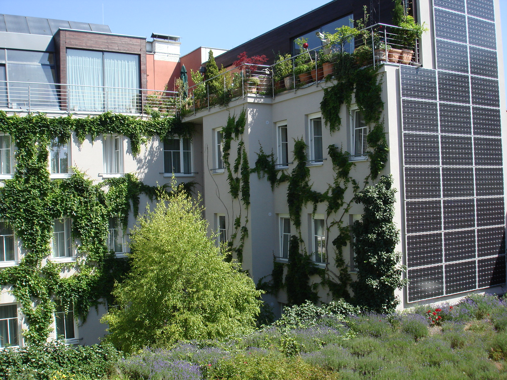 Boutiquehotel Stadthalle Wien